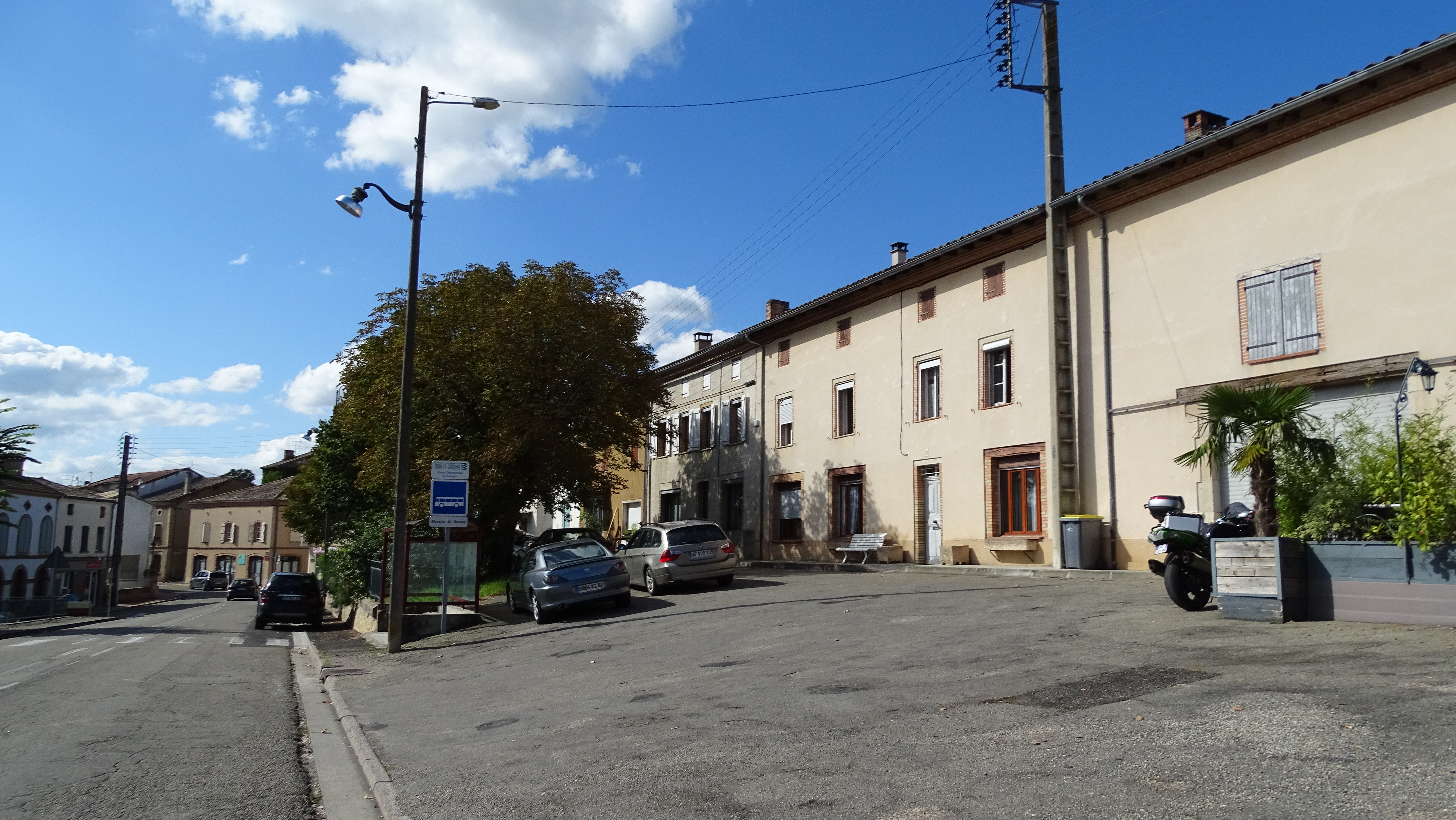 Monclar-de-Quercy